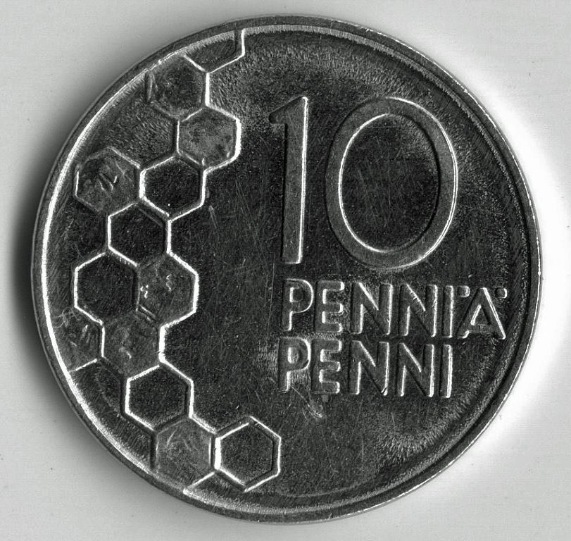 SUOMI / Finland, Penni, 1990.